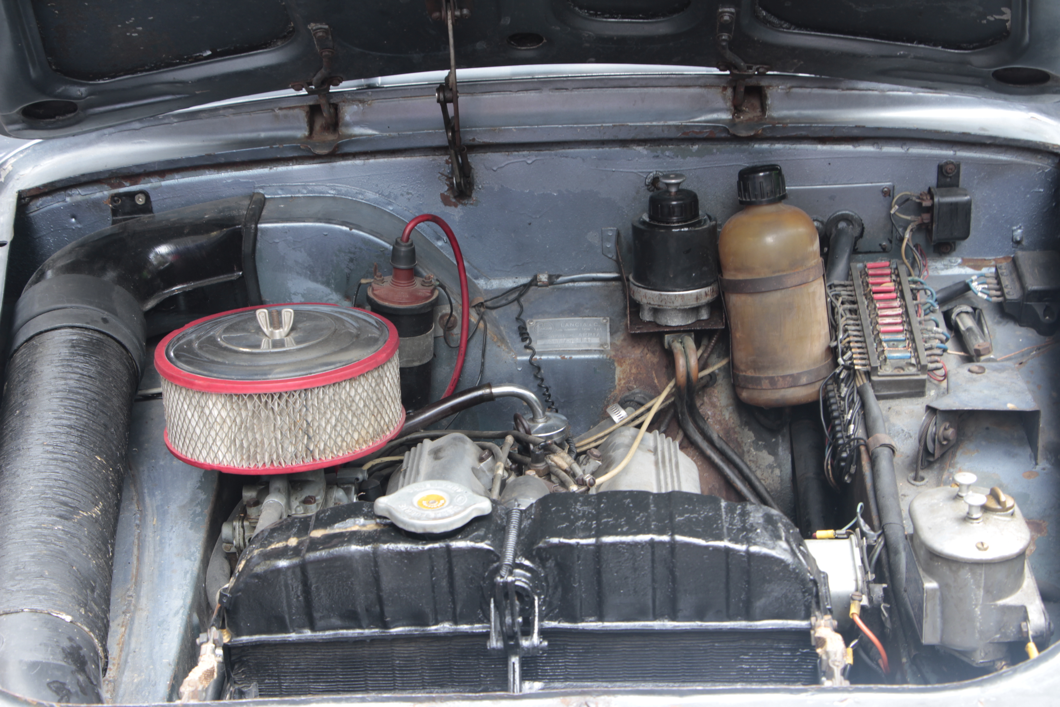 Desfile de autos clásicos que se llevo a cabo en la Ciudad de México, el 5 de octubre en Reforma y que rompió el Record Guinness.